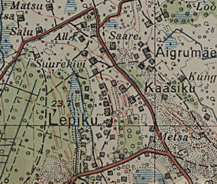 Lepiku küla 1936. aasta Tallinna ümbruse kaardil